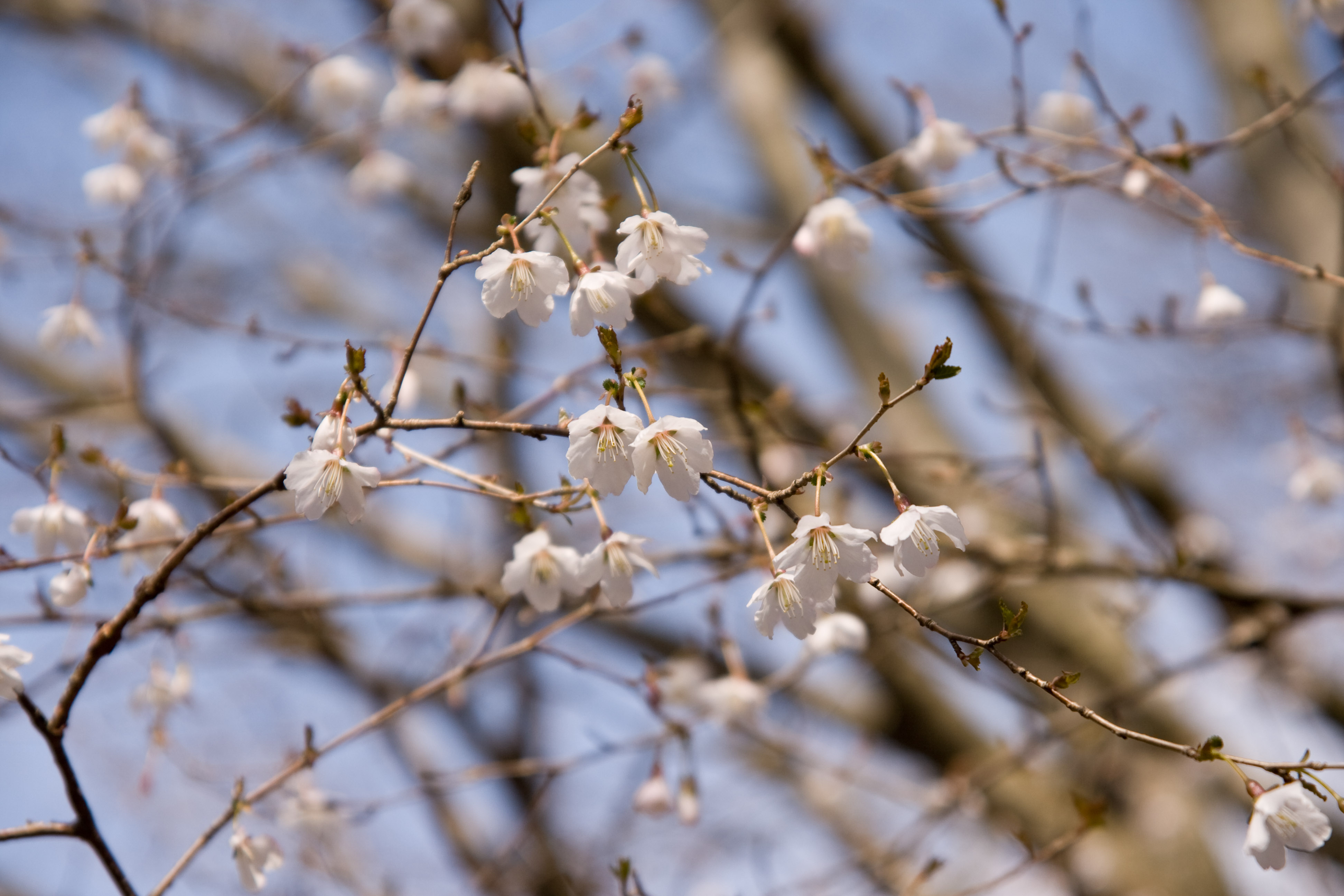 マメザクラ (学名:Prunus incisa)